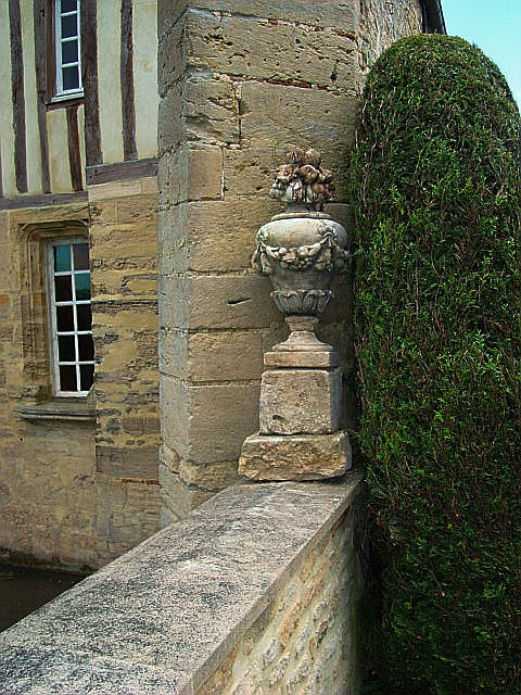 Evolution de l'architecture et de la décoration du manoir de BOISSEY CALVADOS